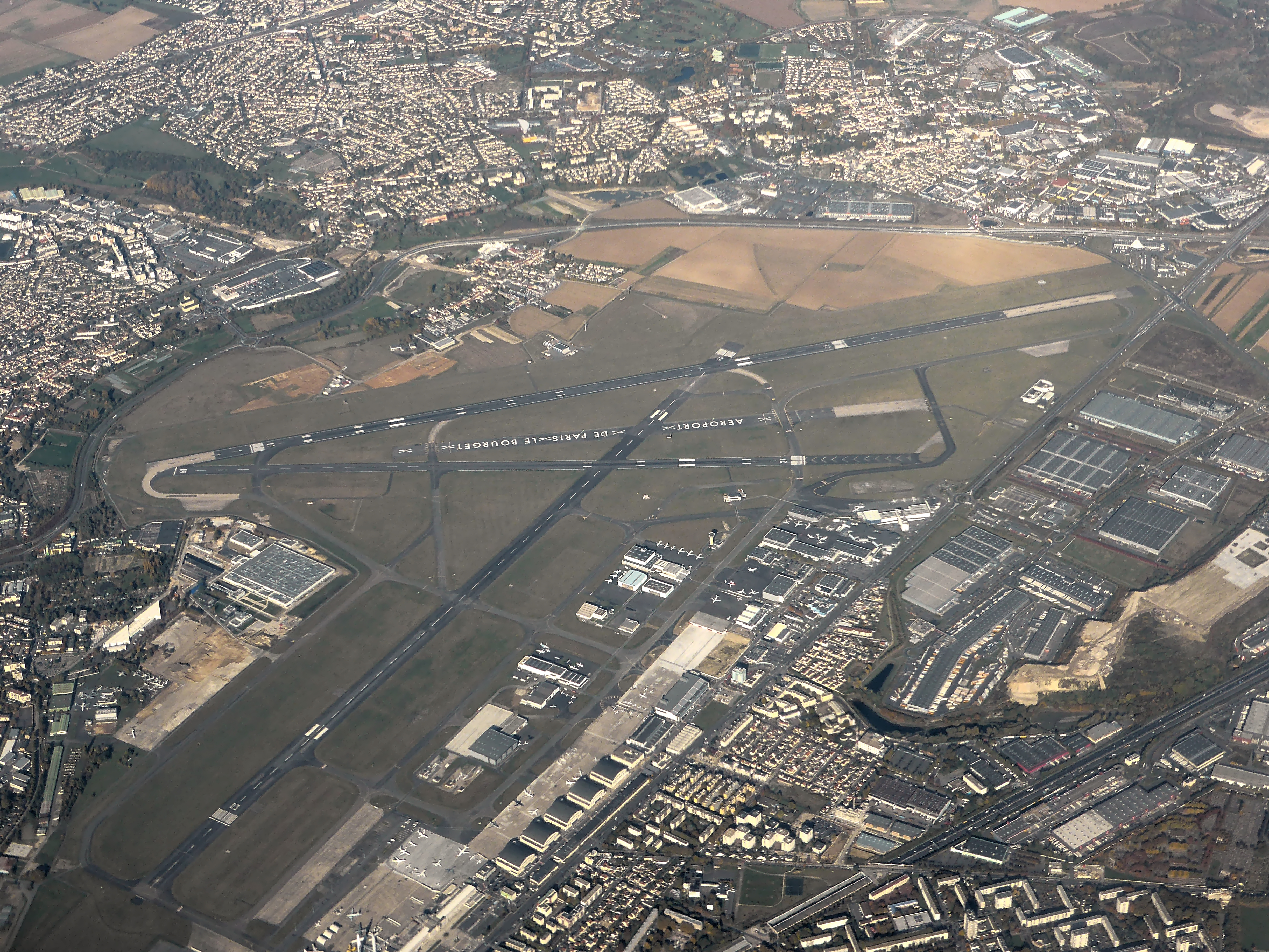 Vue aérienne de l'aéroport Paris Le Bourget